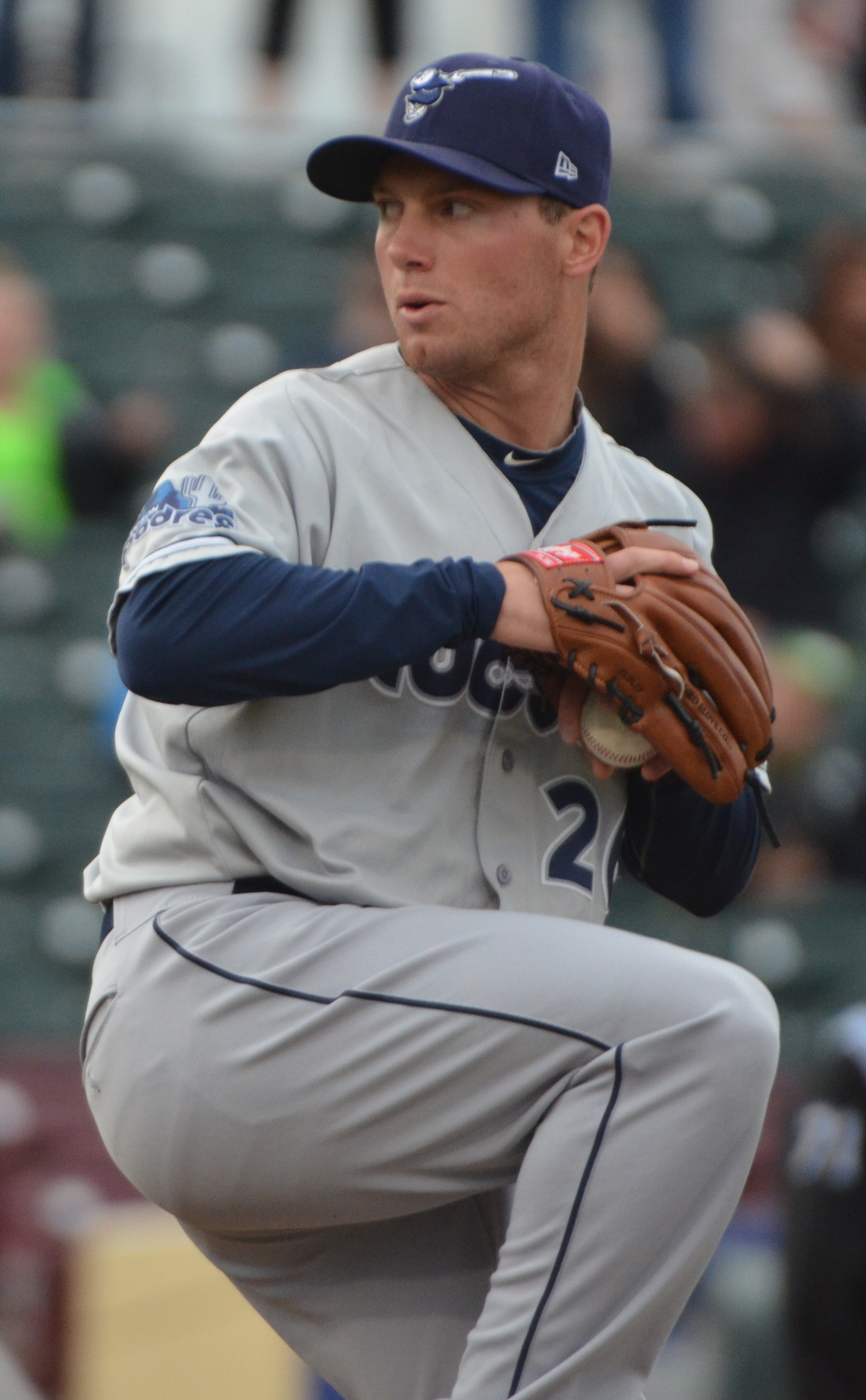 Robbie Erlin